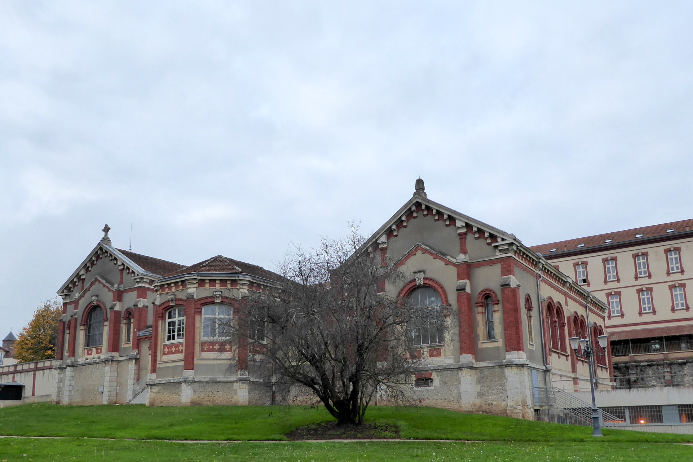 La chapelle du lycée Marceau, Chartres, Eure-et-Loir (France).